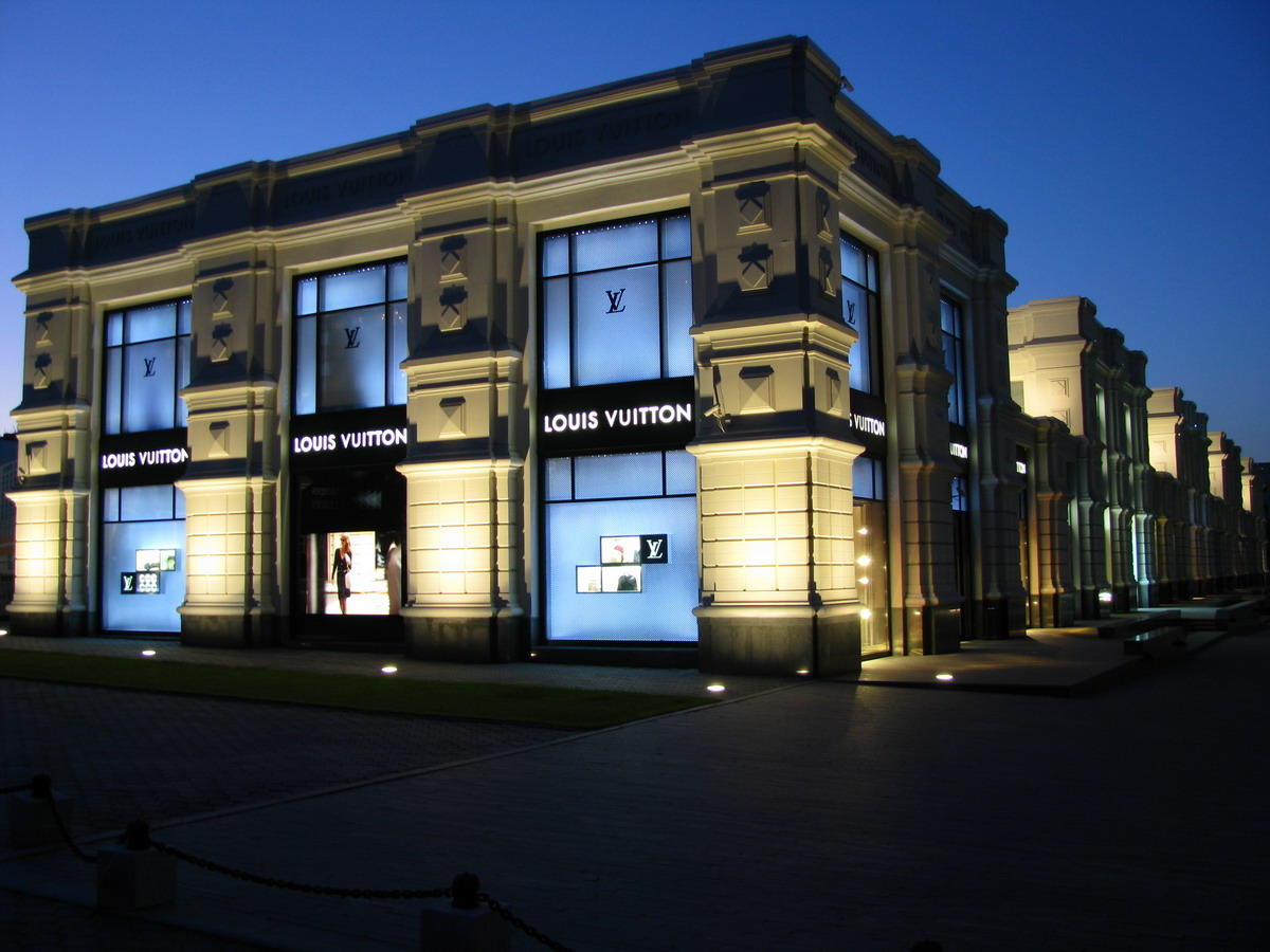 Бутик Louis Vuitton в Екатеринбурге